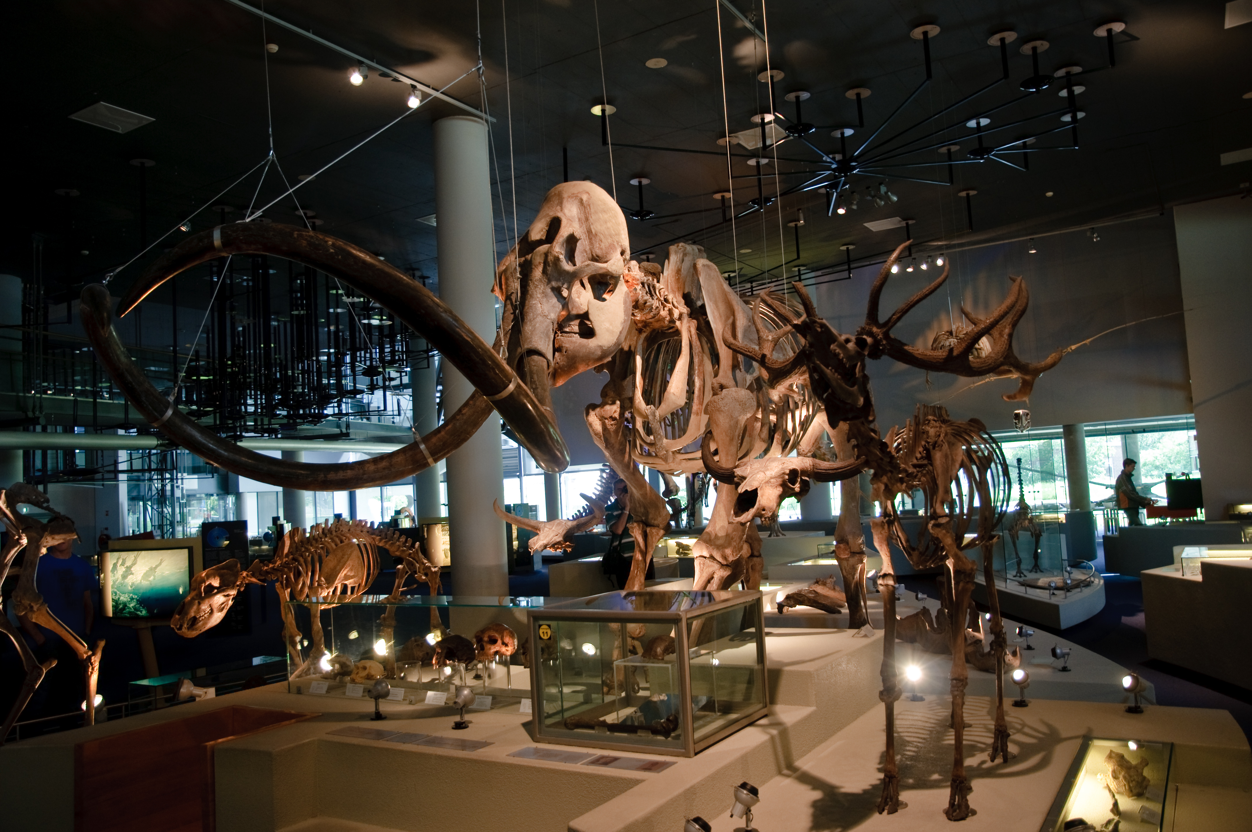 Mammoet Mammoet